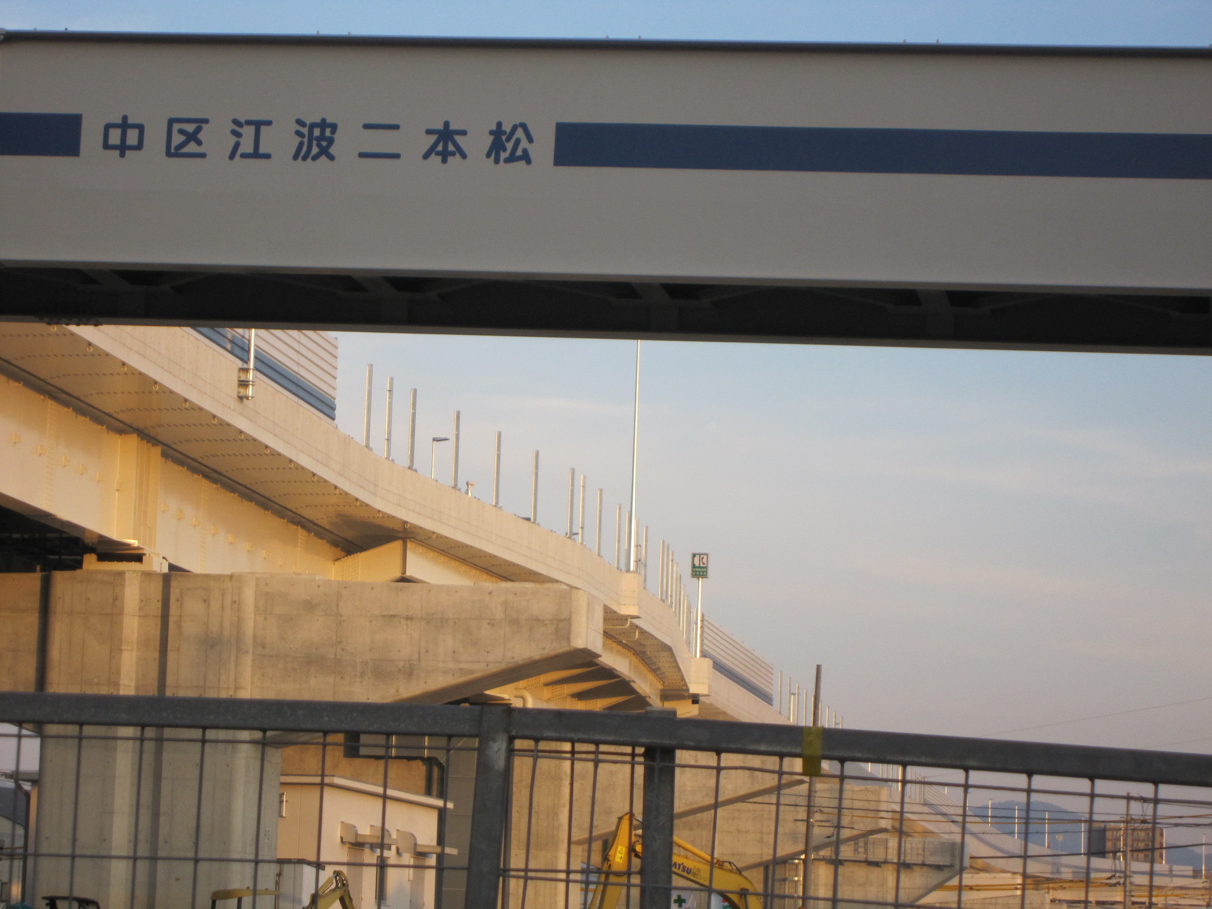 建設中の広島南道路・広島高速３号線中区江波地区。吉島方面。